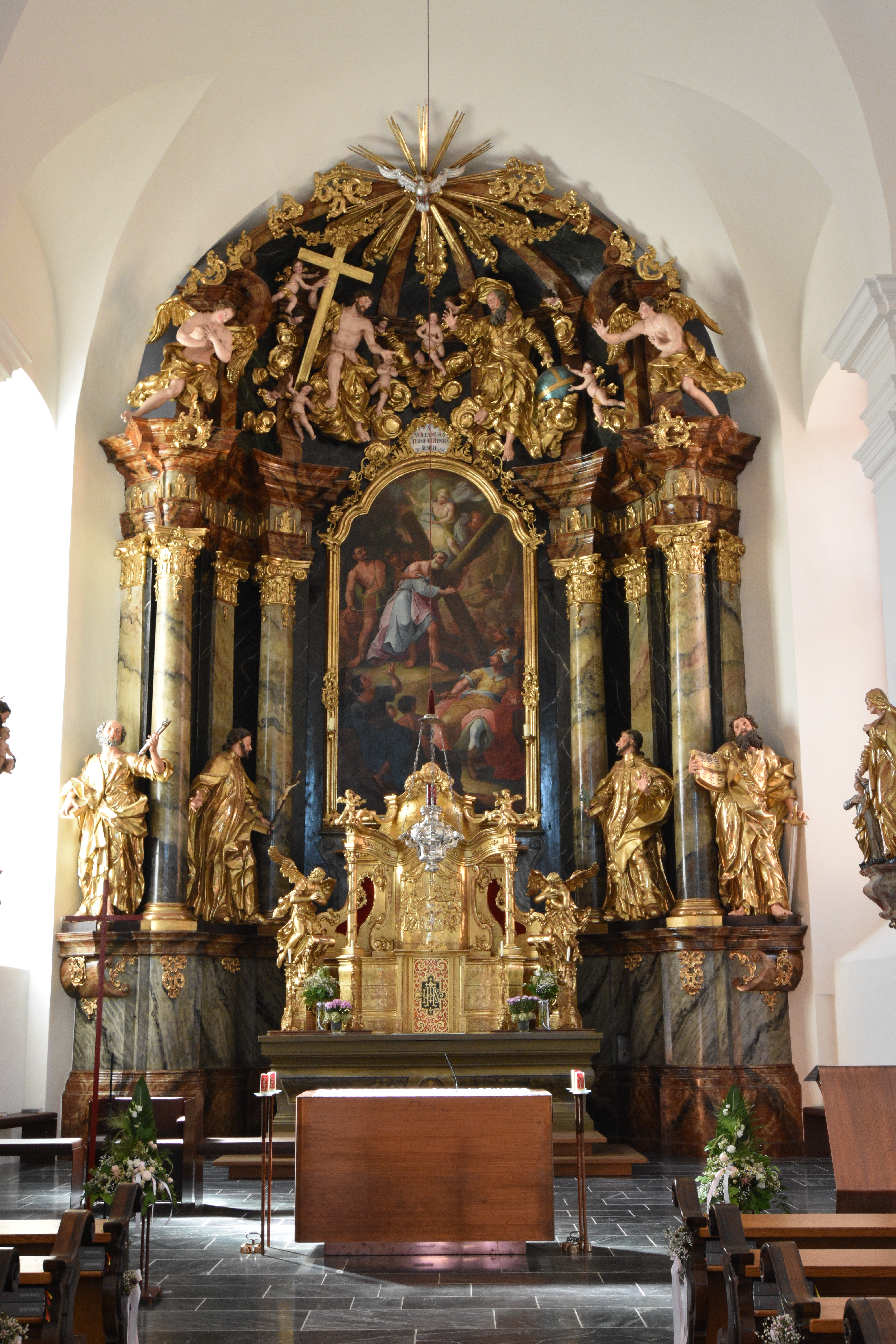 Pfarrkirche Anger Steiermark Interior